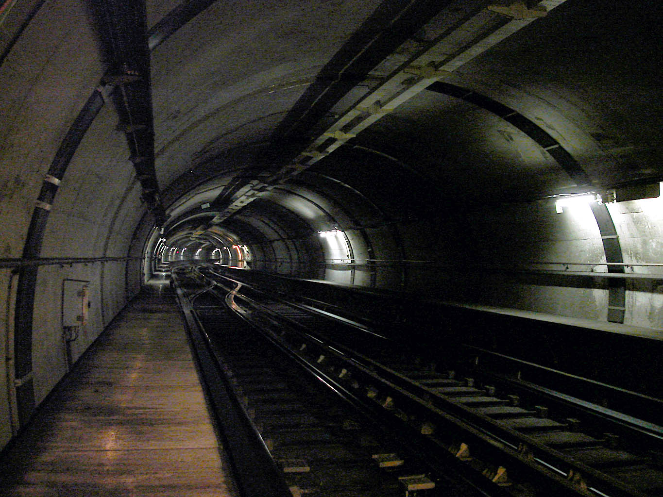 Station La Timone du métro de Marseille, France. Le tunnel en direction de La Blancarde.